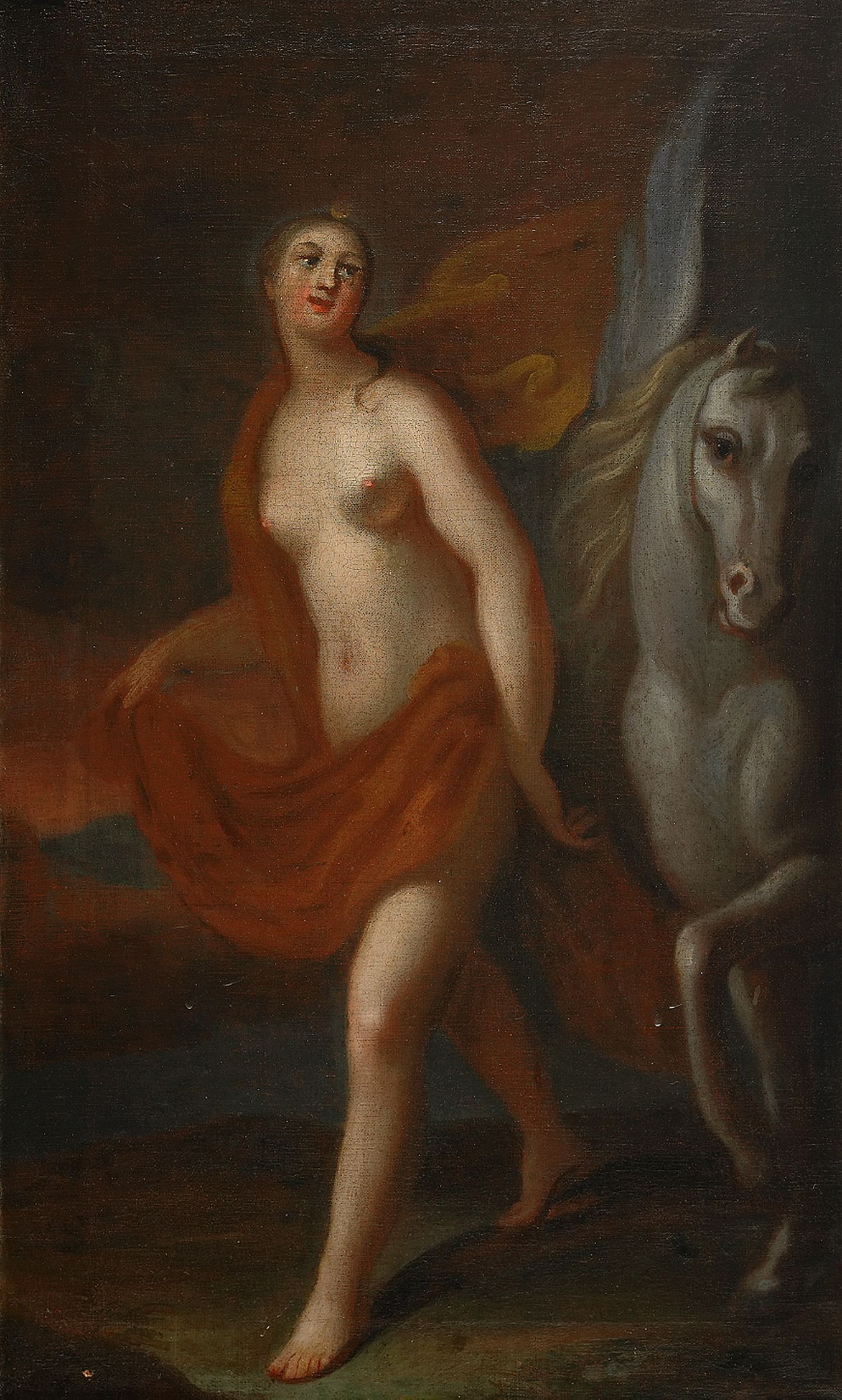 Athéna and Pégase